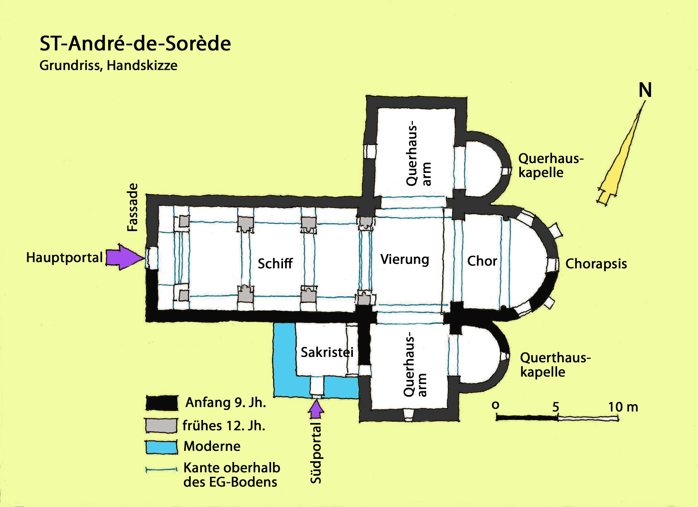 St-Adré-de-Sorède, Aufriss, Handskizze